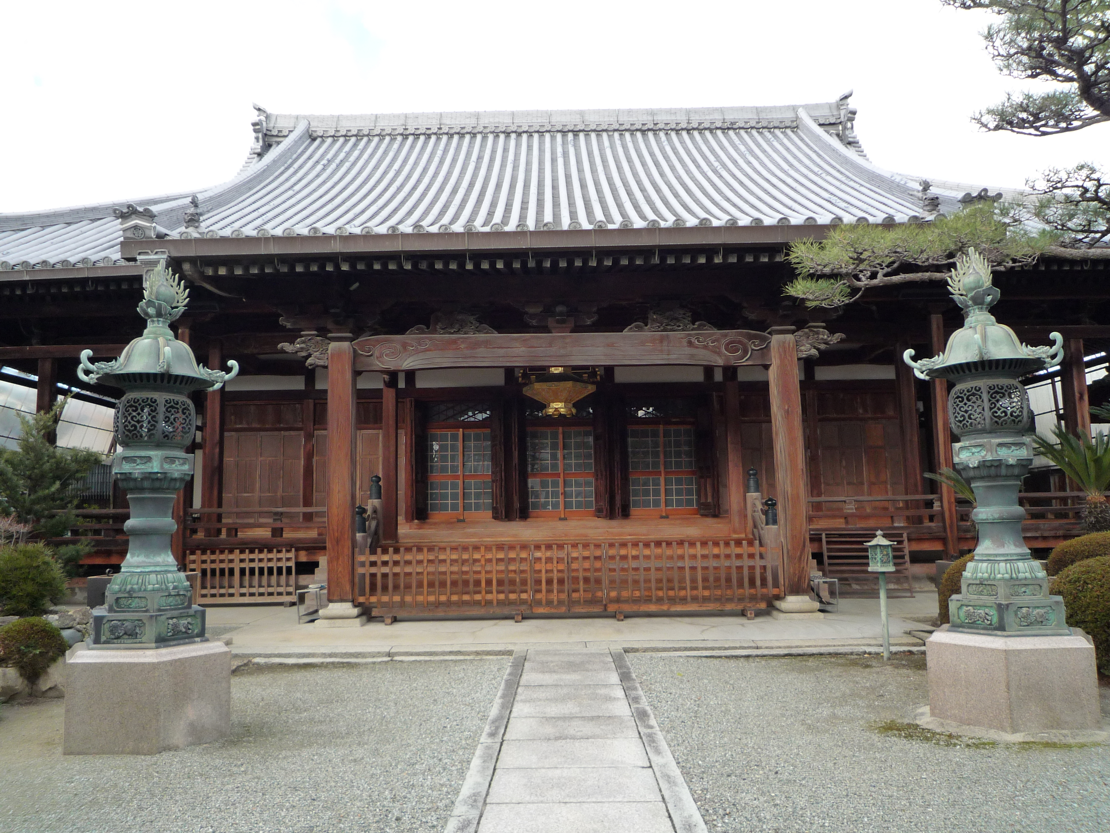 報恩寺（大阪府豊中市）の本堂